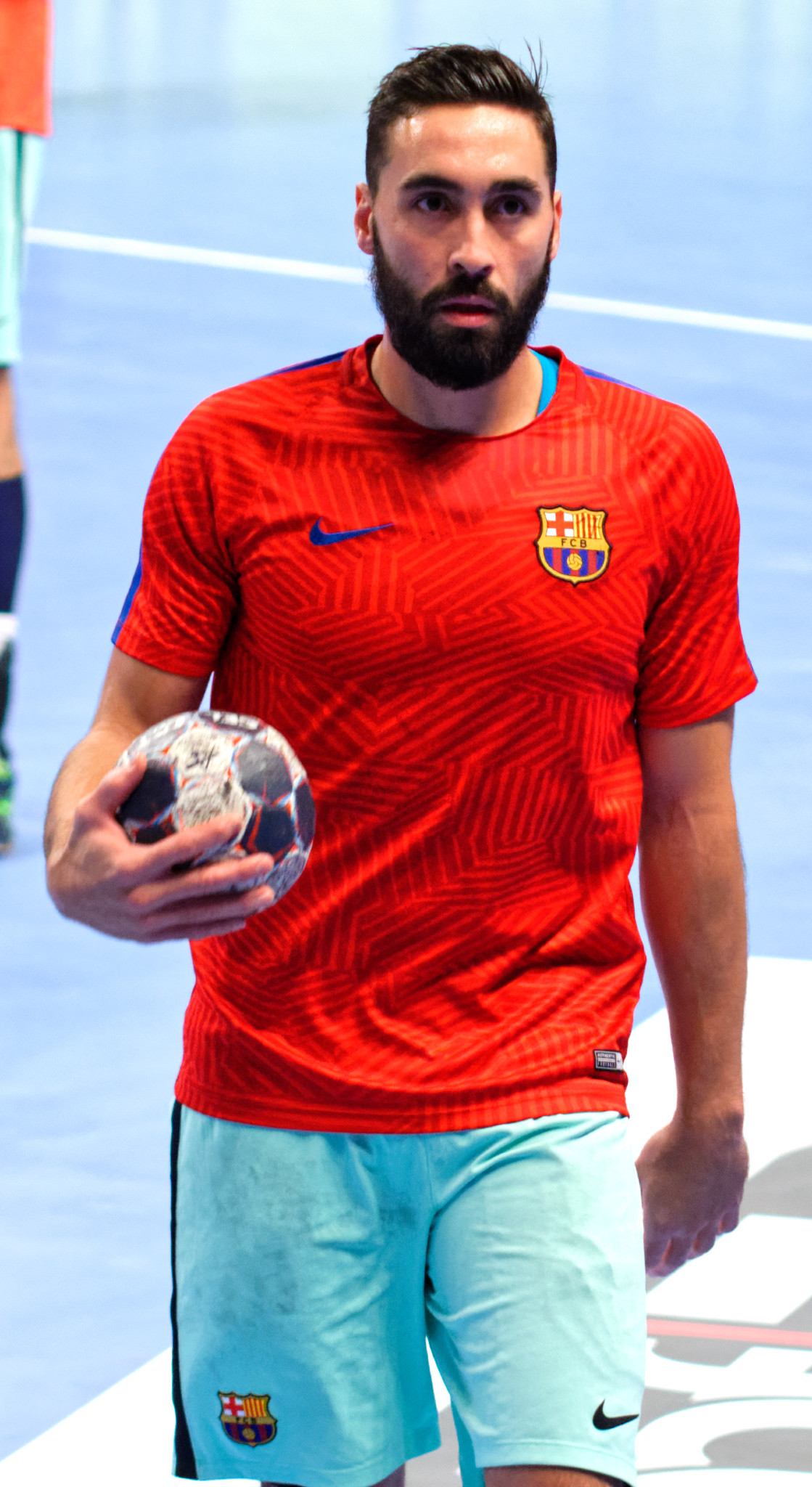 Rencontre de phase de groupe de la ligue des champions 2016-17 entre le PSG et le FC Barcelone. A Coubertin, le 12 novembre 2016.